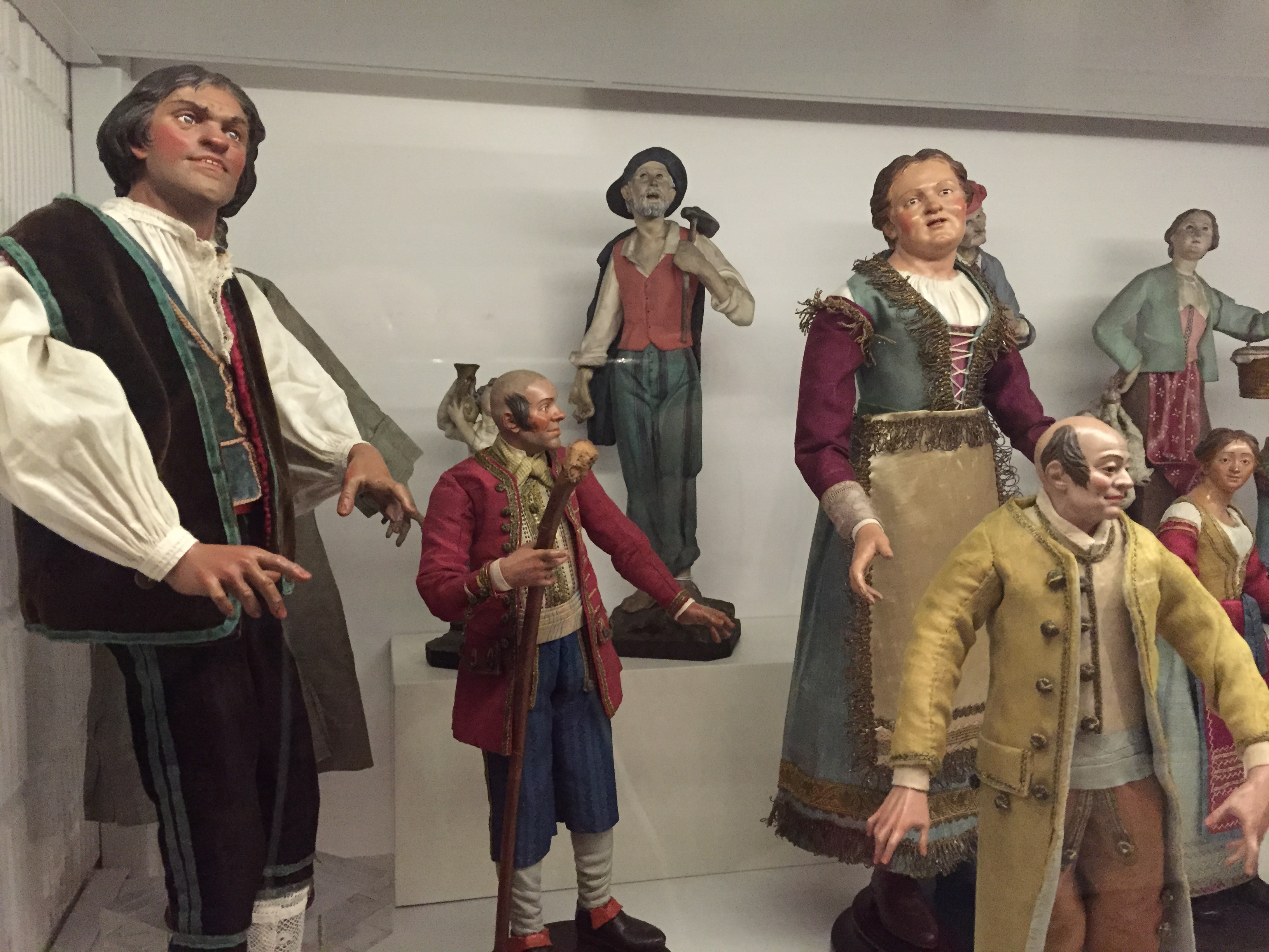 Magatzem obert del Museu etnològic de Barcelona